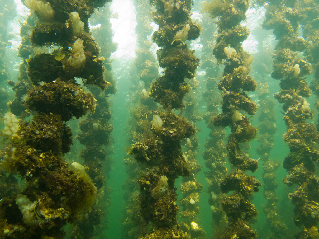 Vue sous marine de Tables Ostréicoles de l'étang de Thau. On peut observer une colonisation d'Ascidies blanches (Phallusia mammillata)